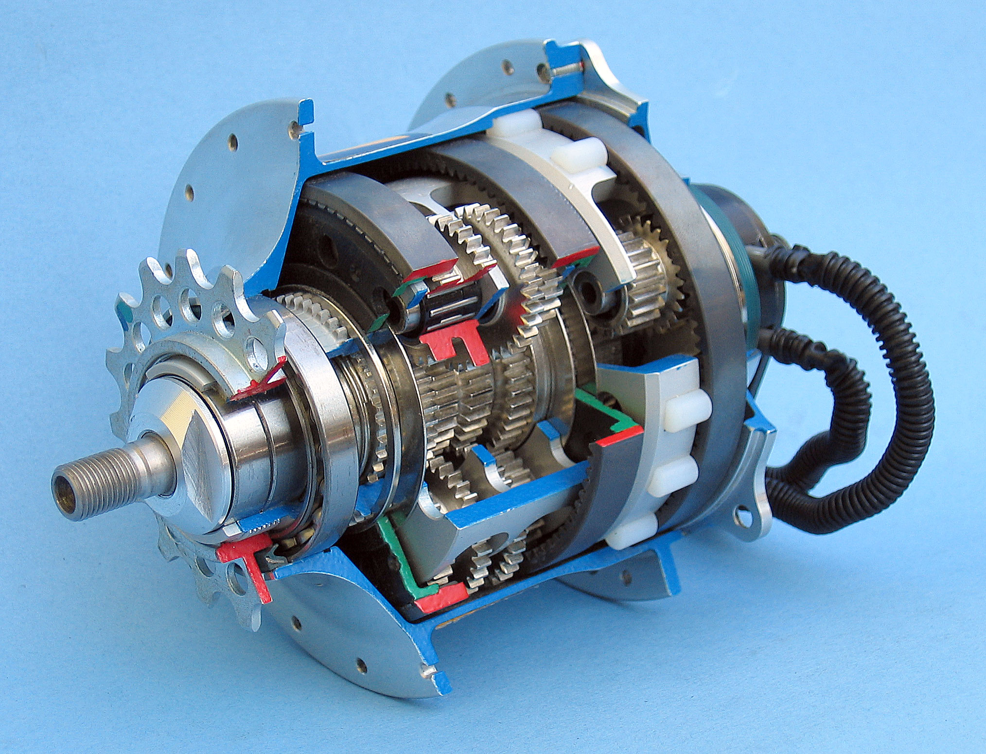 14Gang-Nabe Rohloff Speedhub 500/14